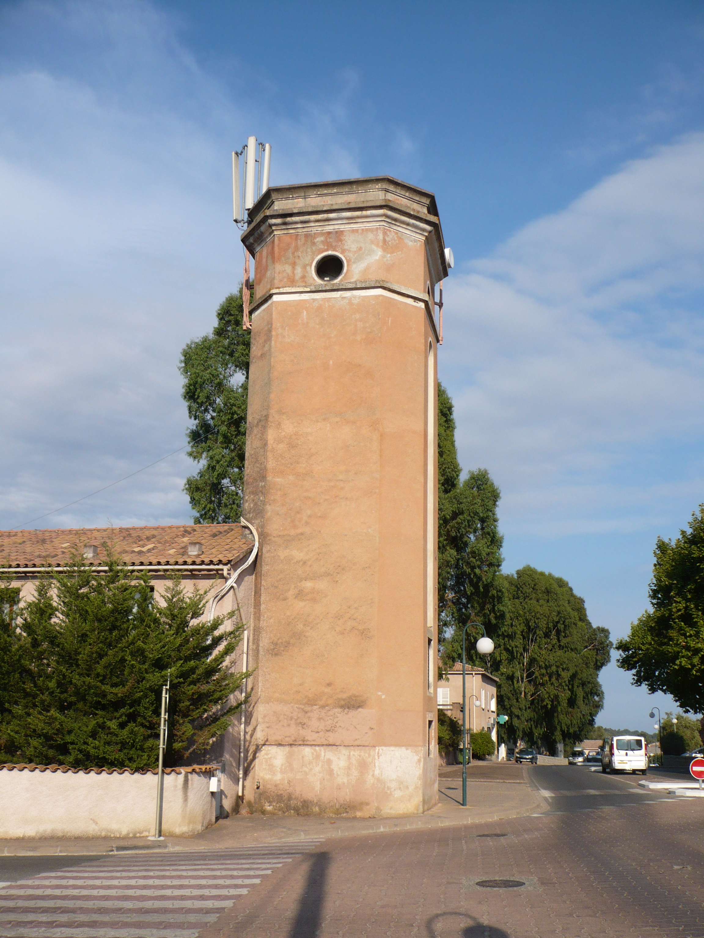 La tour de la FORTEF à Migliacciaru accueillait une horloge et une sirène pour informer les ouvriers de l'heure. Elle trône toujours au coeur du village.